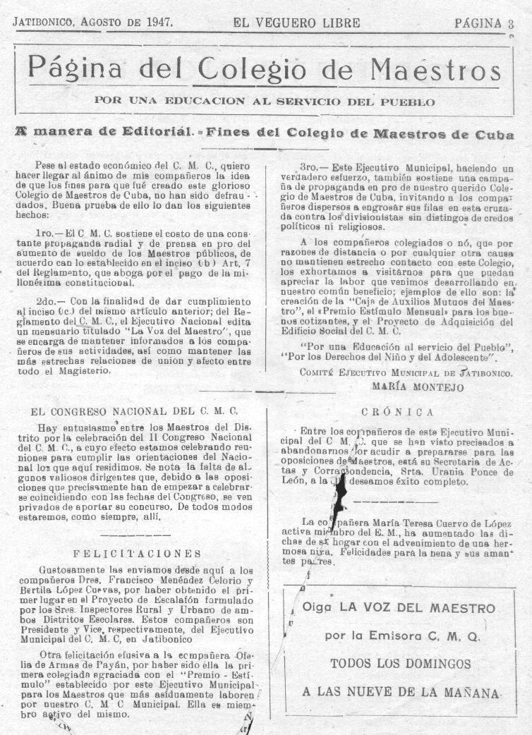 Página del Veguero Libre